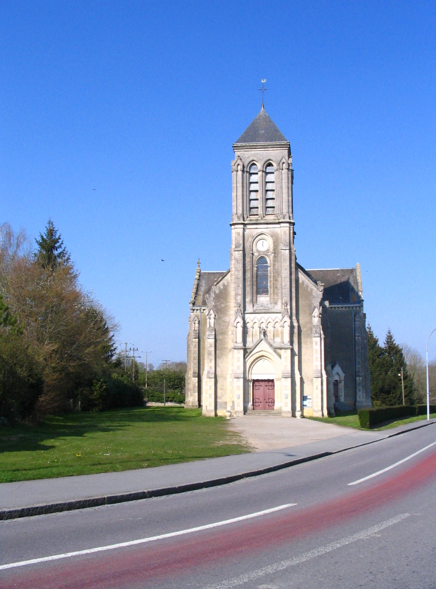 église de Saint-Evroult-Notre-Dame-du-Bois, Orne ,France